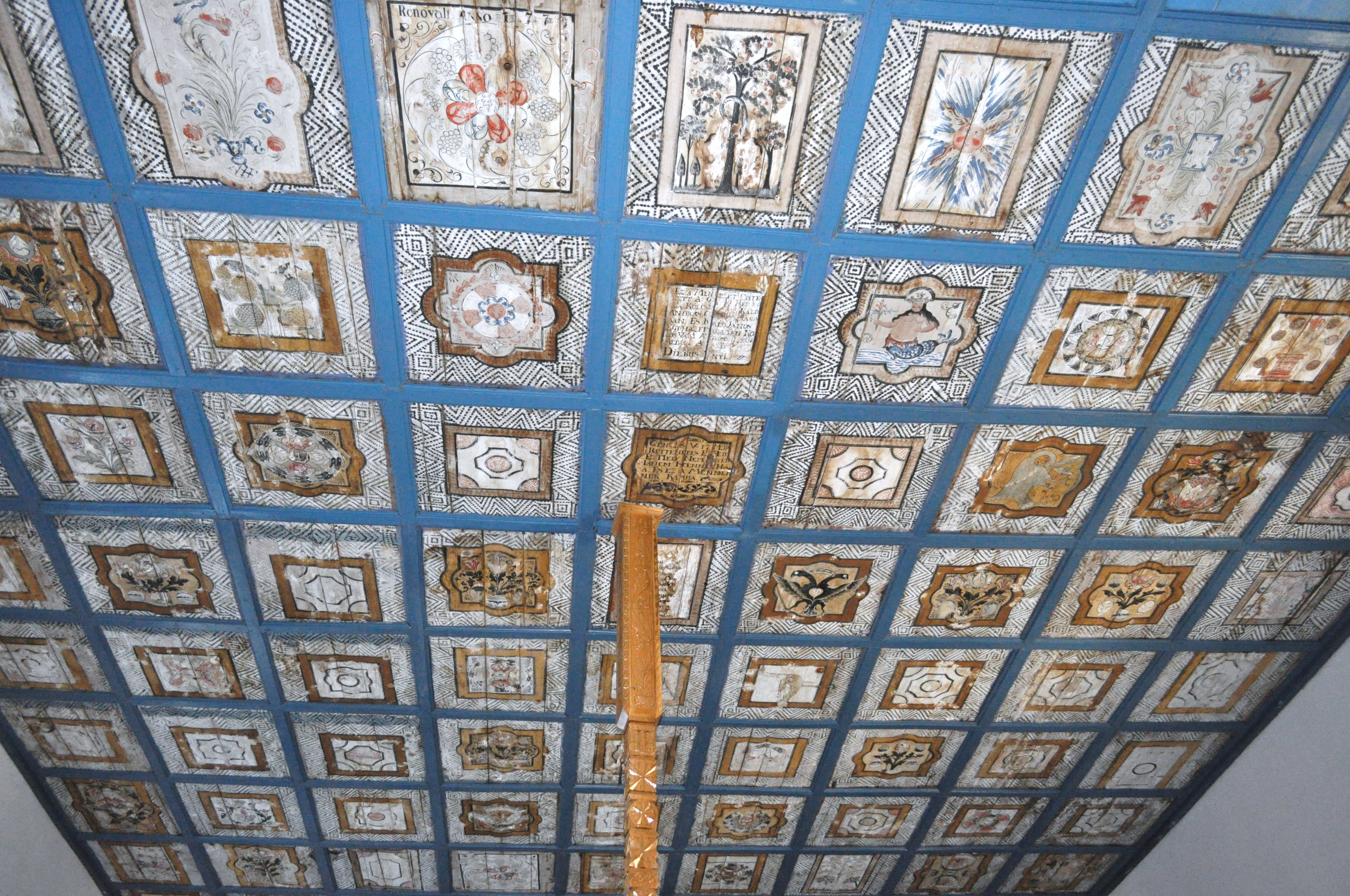 Biserica reformată, sat DUMBRAVA; comuna CĂPUŞU MARE, județul Cluj